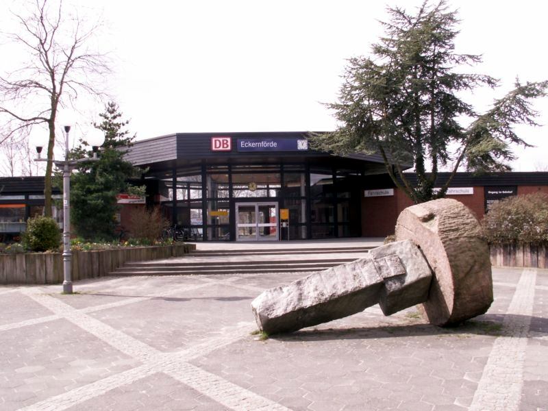 Bahnhofsvorplatz Eckernförde